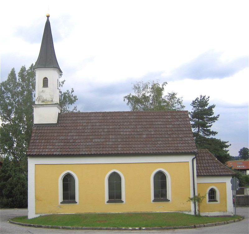 Kirche in Kleindingharting